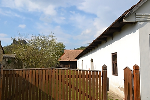 A Tájház a településen belül a vár hegyének lábánál helyezkedik el egy, a régi tájépítészet jegyet magán viselő parasztházban. A tájház kiállításai bemutatják a térség hajdani életét, történetét, természeti értékeit, eszközeit. A Tájház látogatása során szakvezető mutatja be a kiállításokat.